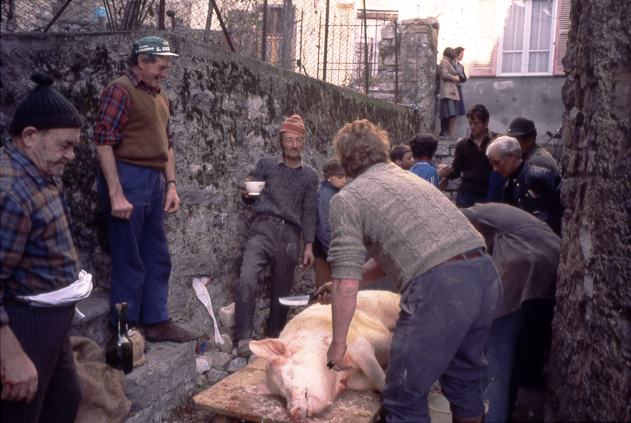 Uccisione del maiale. Archivio Pietro Pensa, fondo fotografico, selezione di Elvia Redaelli, 2008, n. 51.